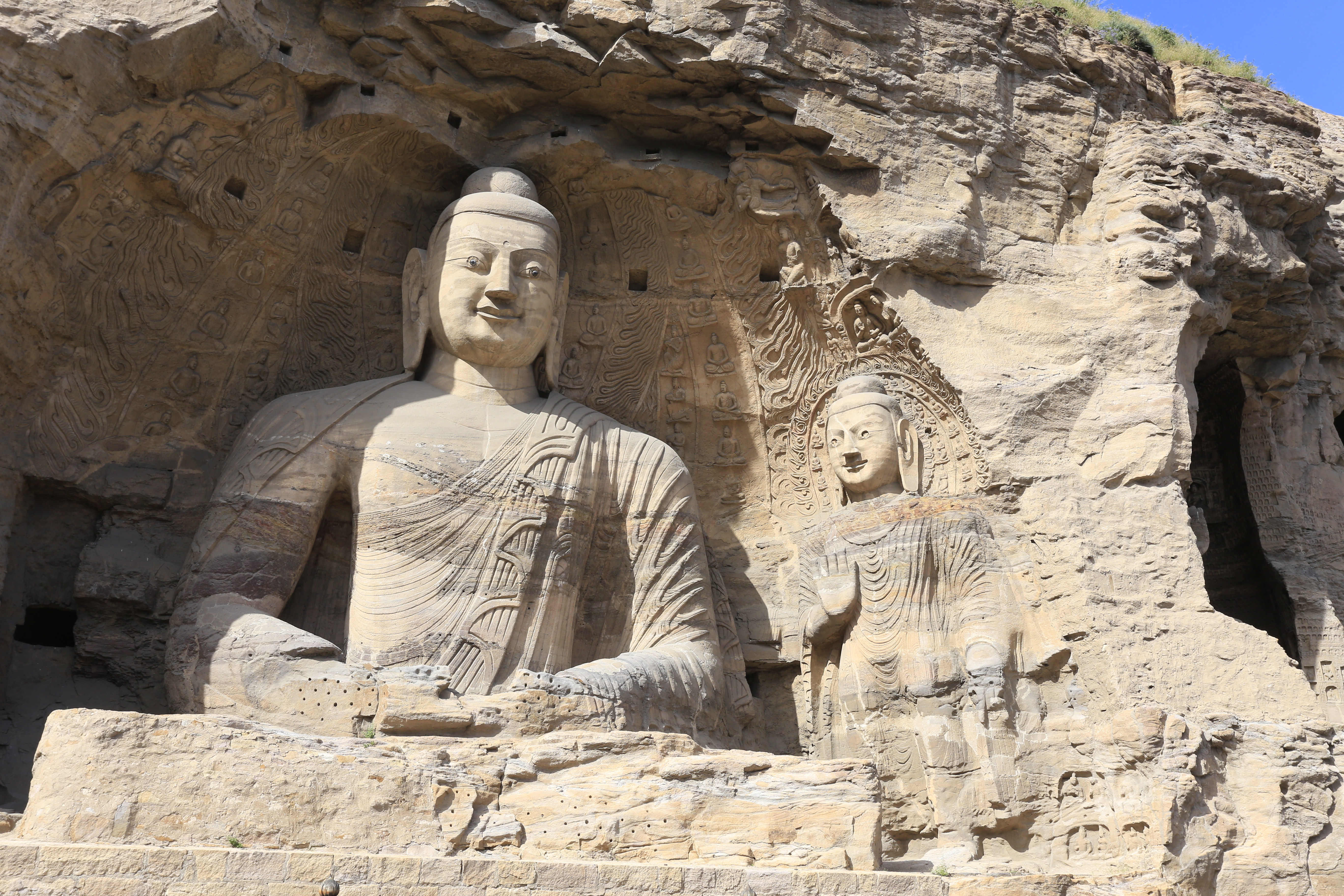 大同云冈石窟—— 第20窟